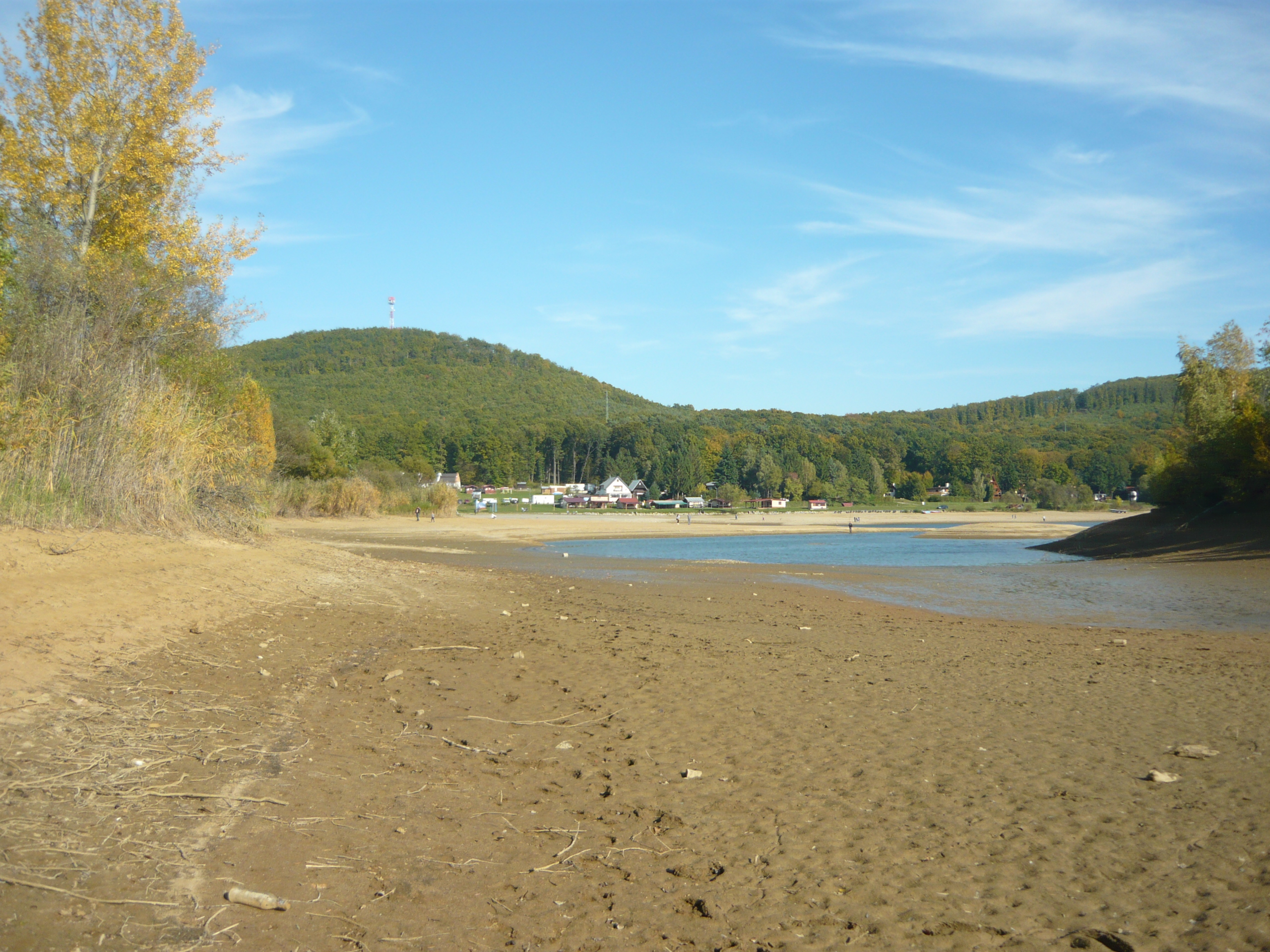 VN Ružiná, október 2019